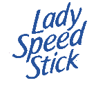 Imagen representativa del desodorante femenino de colpal